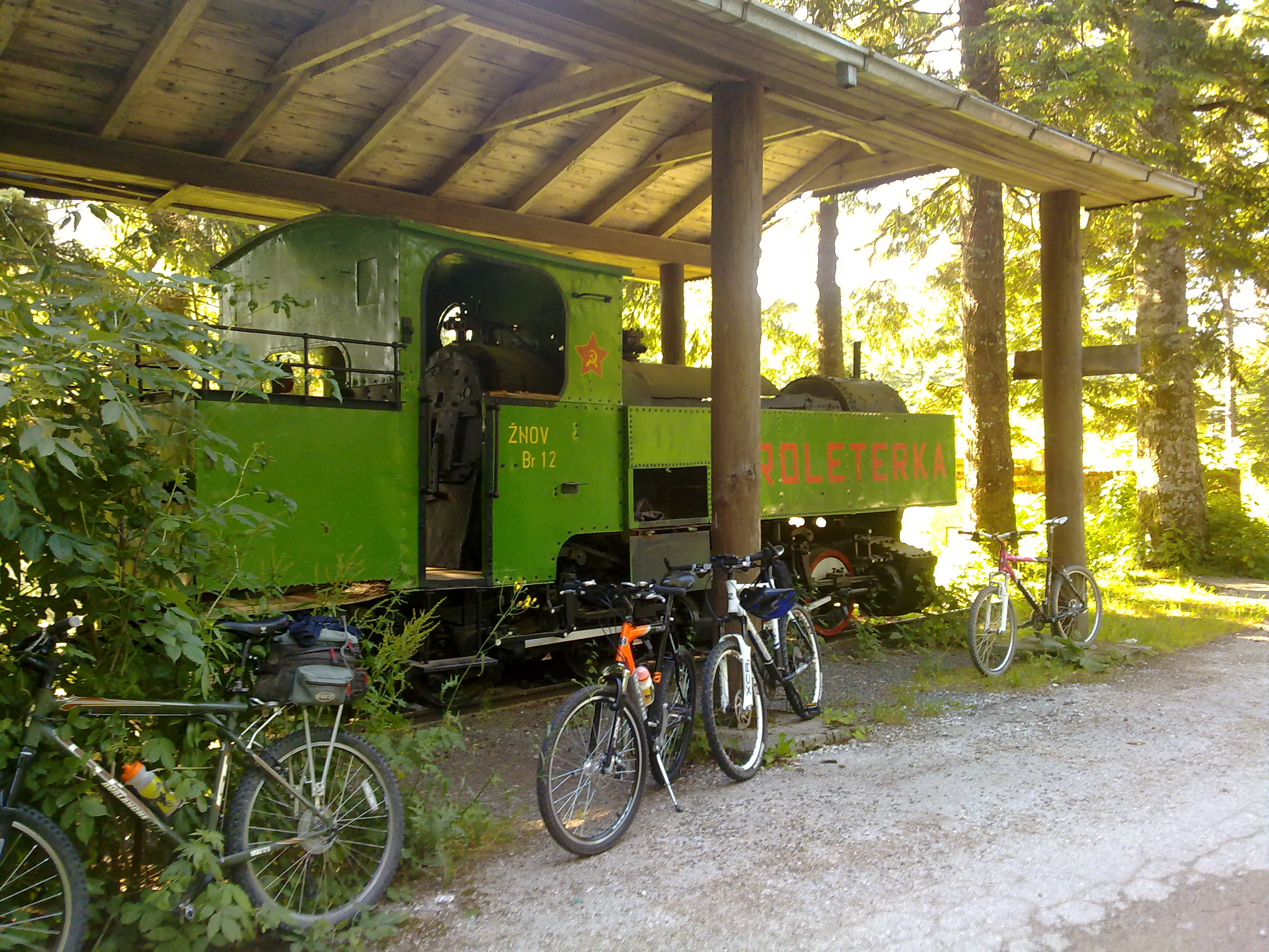 Proleterka